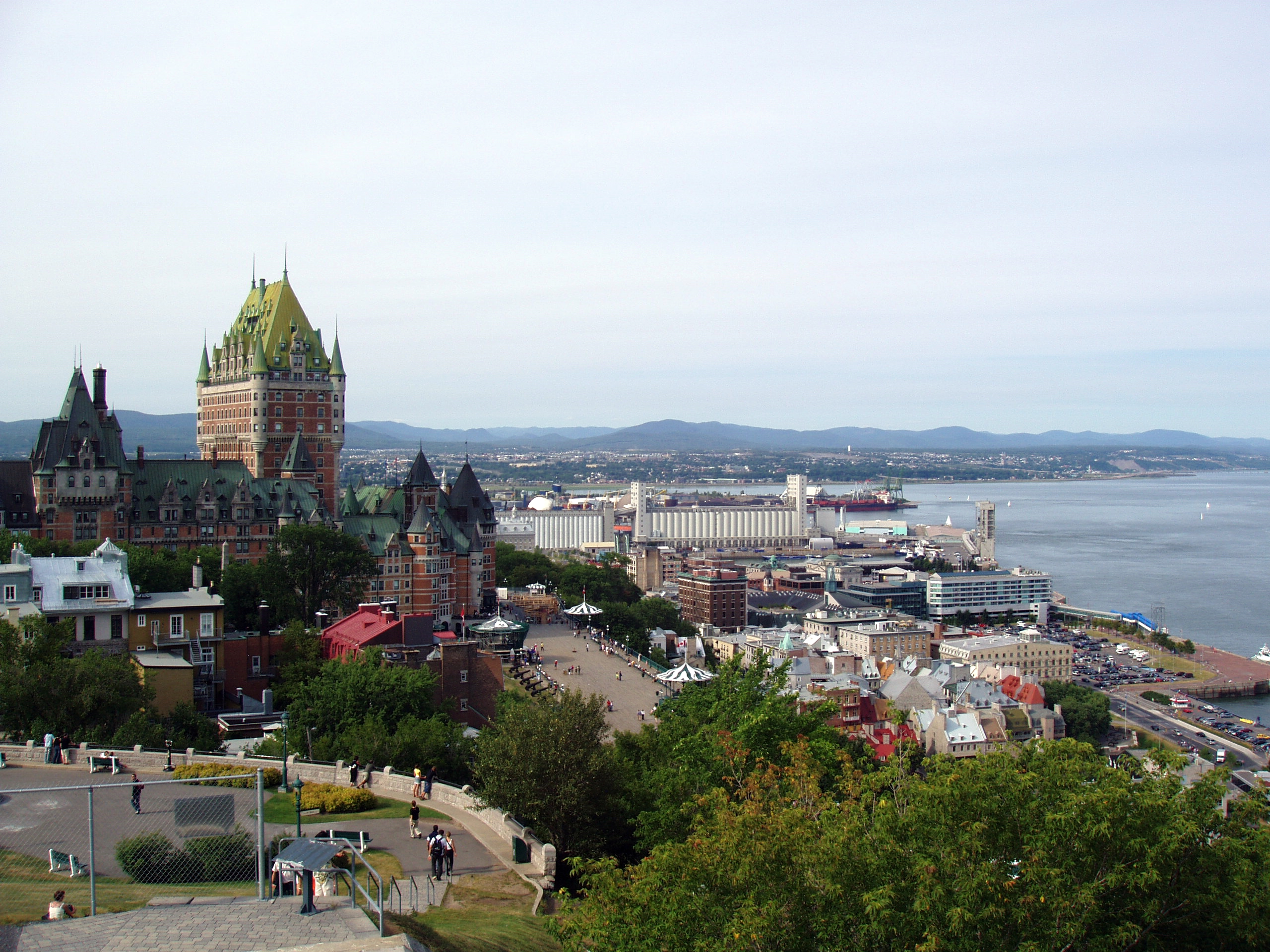 eigen foto, gemaakt in augustus 2005 Jos Scheffelaar